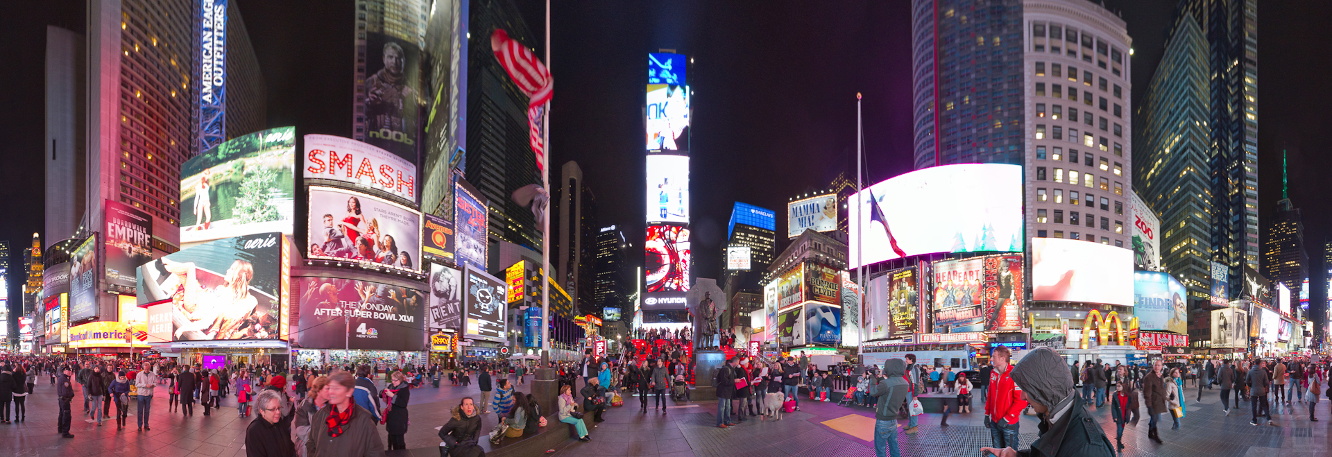 360° Panorama